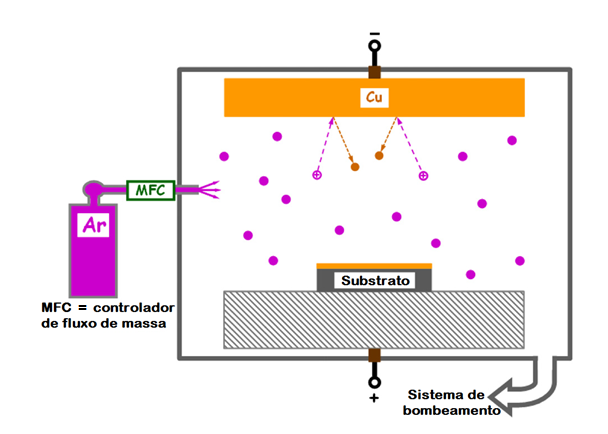 Figura adaptada de: GREENE, J. E. (2017). «Review Article: Tracing the recorded history of thin-film sputter deposition: From the 1800s to 2017». Journal of Vacuum Science & Technology. 35. 61 páginas.